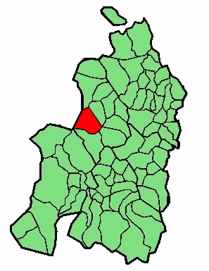 aipaturiko udalerriaren kokapena Nafarroa Beherean